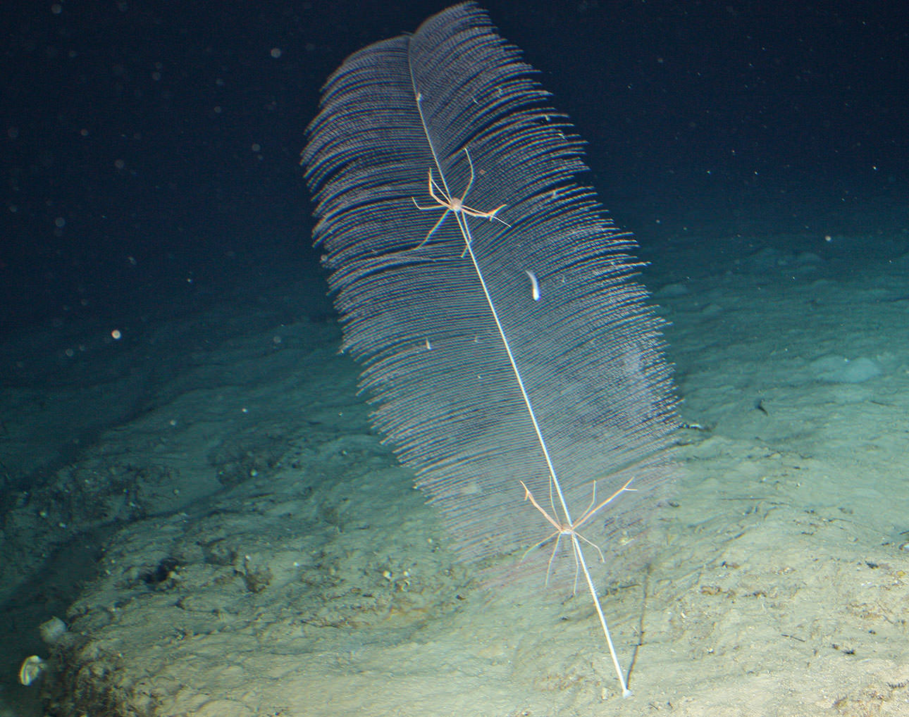 Bathypathes y cangrejos de la superfamilia Galatheoidea, en Honduras, a 400 m.